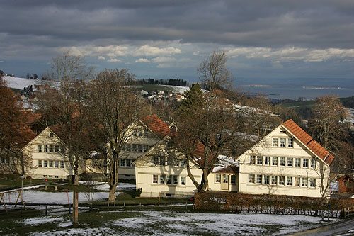 Pestalozzidorf in Trogen